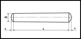 DIN 1